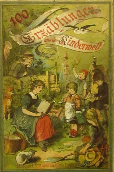 L. Morgenstern.jpg